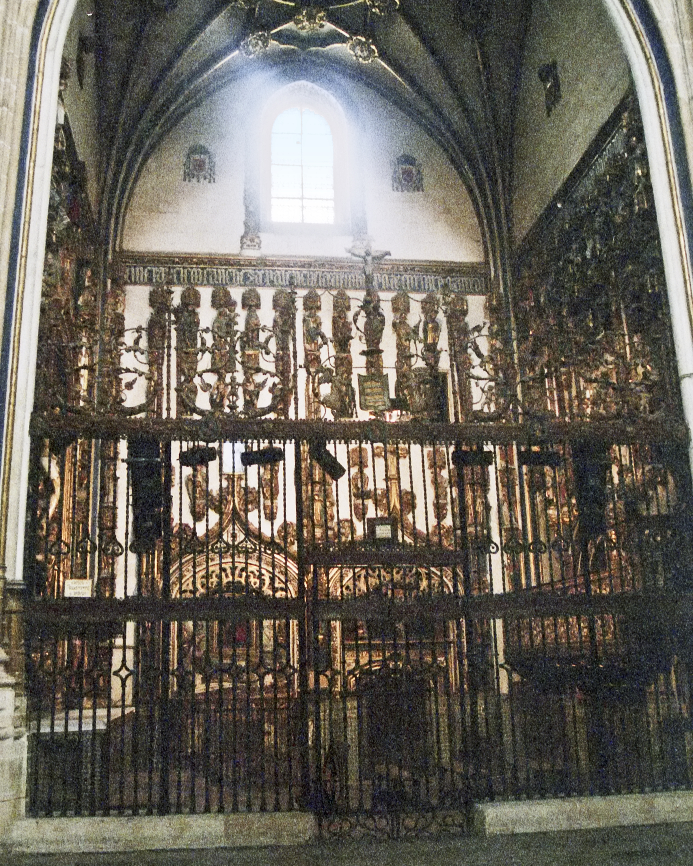 Capilla Dorada o de Todos los Santos, Catedral Nueva, Salamanca